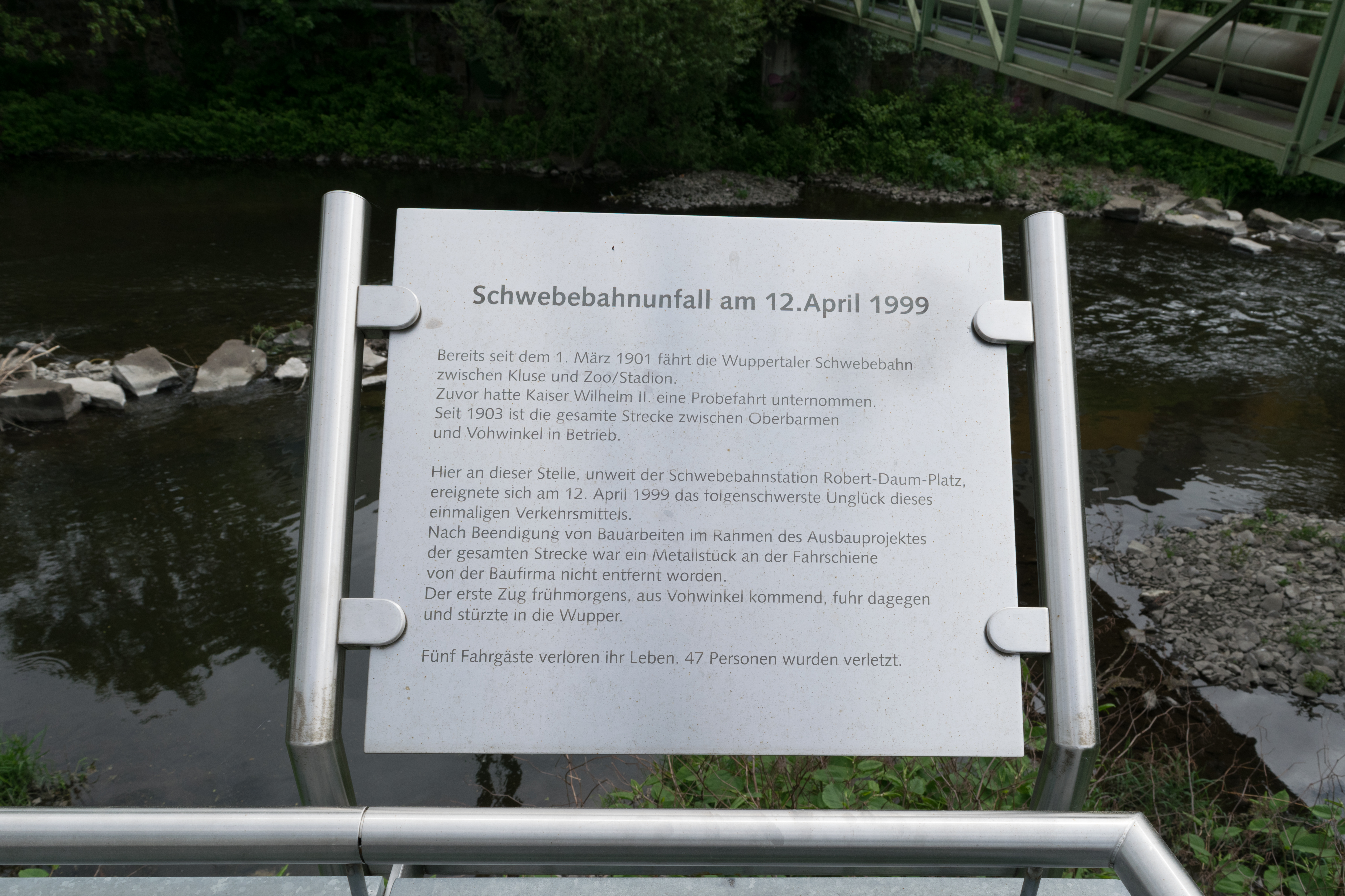 Wupperweg, Wuppertal